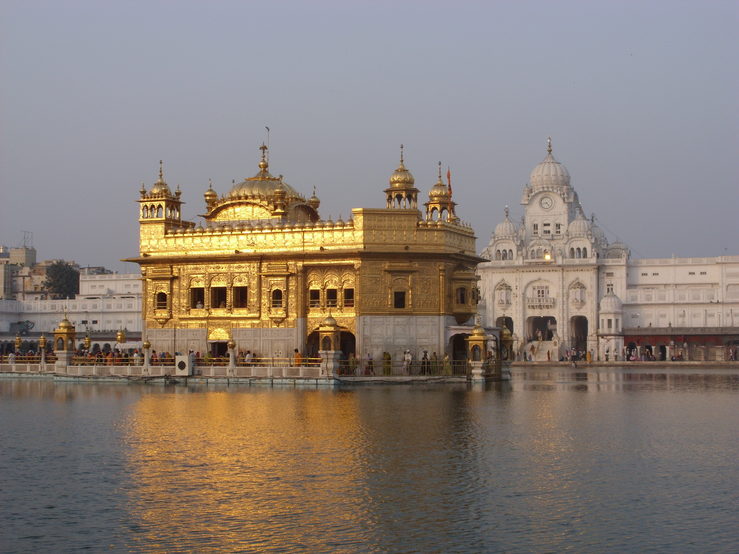 Golden Temple in Amritsar, Punjab, India.